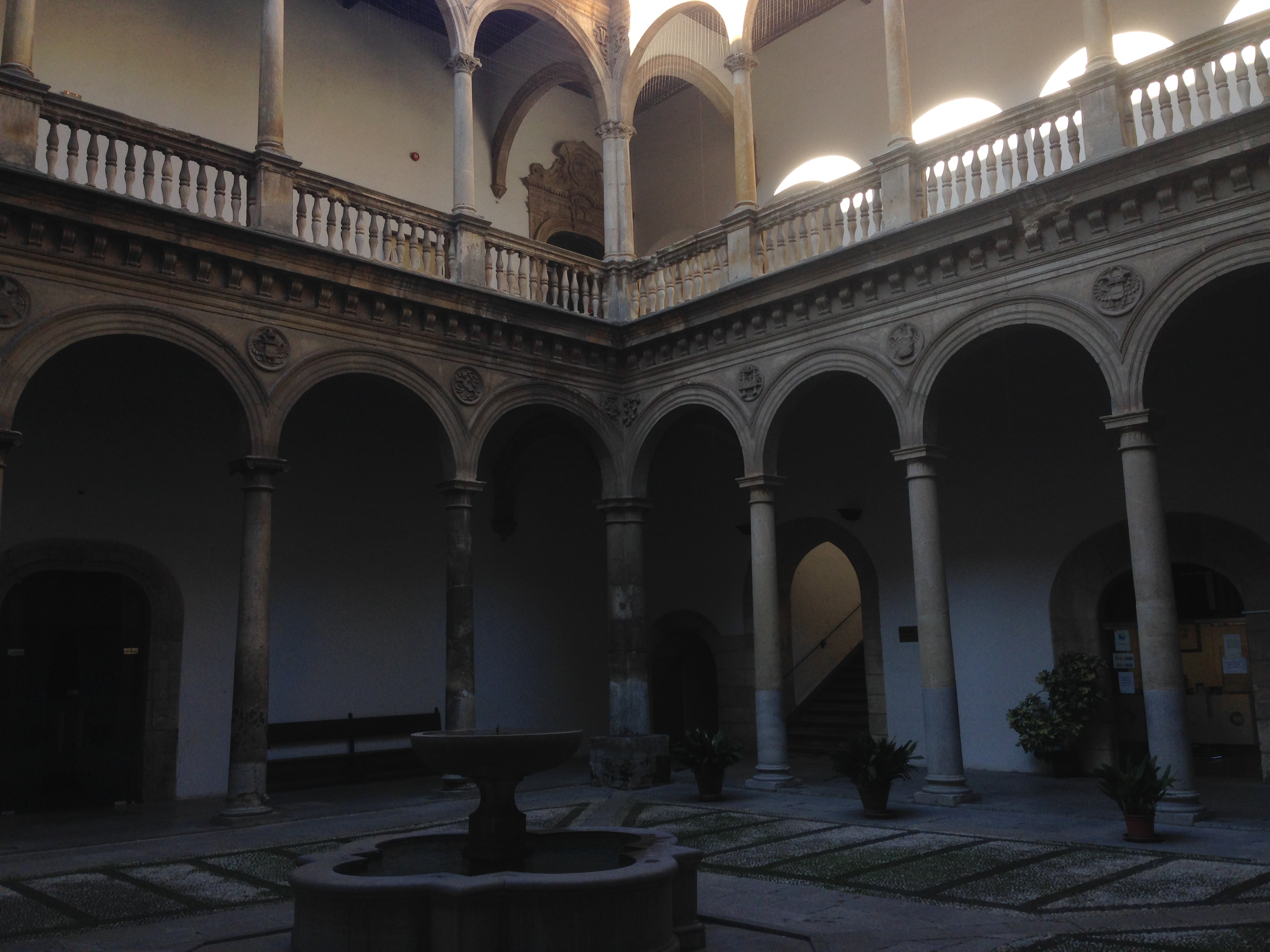 Vista del Patio de la Capilla situado en el Hospital Real de Granada.